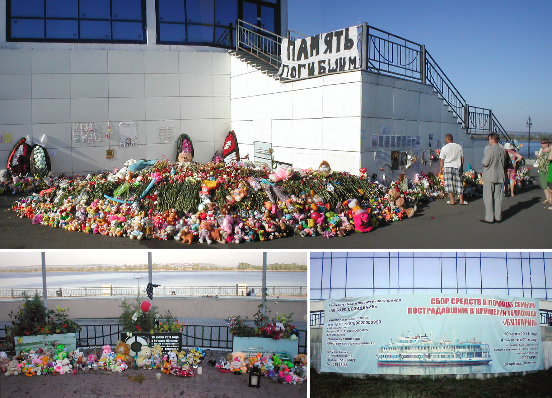 People's memorial in Kazan riverport for died on Bulgaria shipwreck. Народный мемориал в речном порту Казани по погибшим при кораблекрушении Булгарии. 07.2011